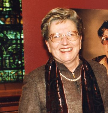 Karmele Esnal andereñoa 1999ko abenduan, Gipuzkoako Foru Aldundiaren jauregian, Abbadia saria jaso zuen egunean.